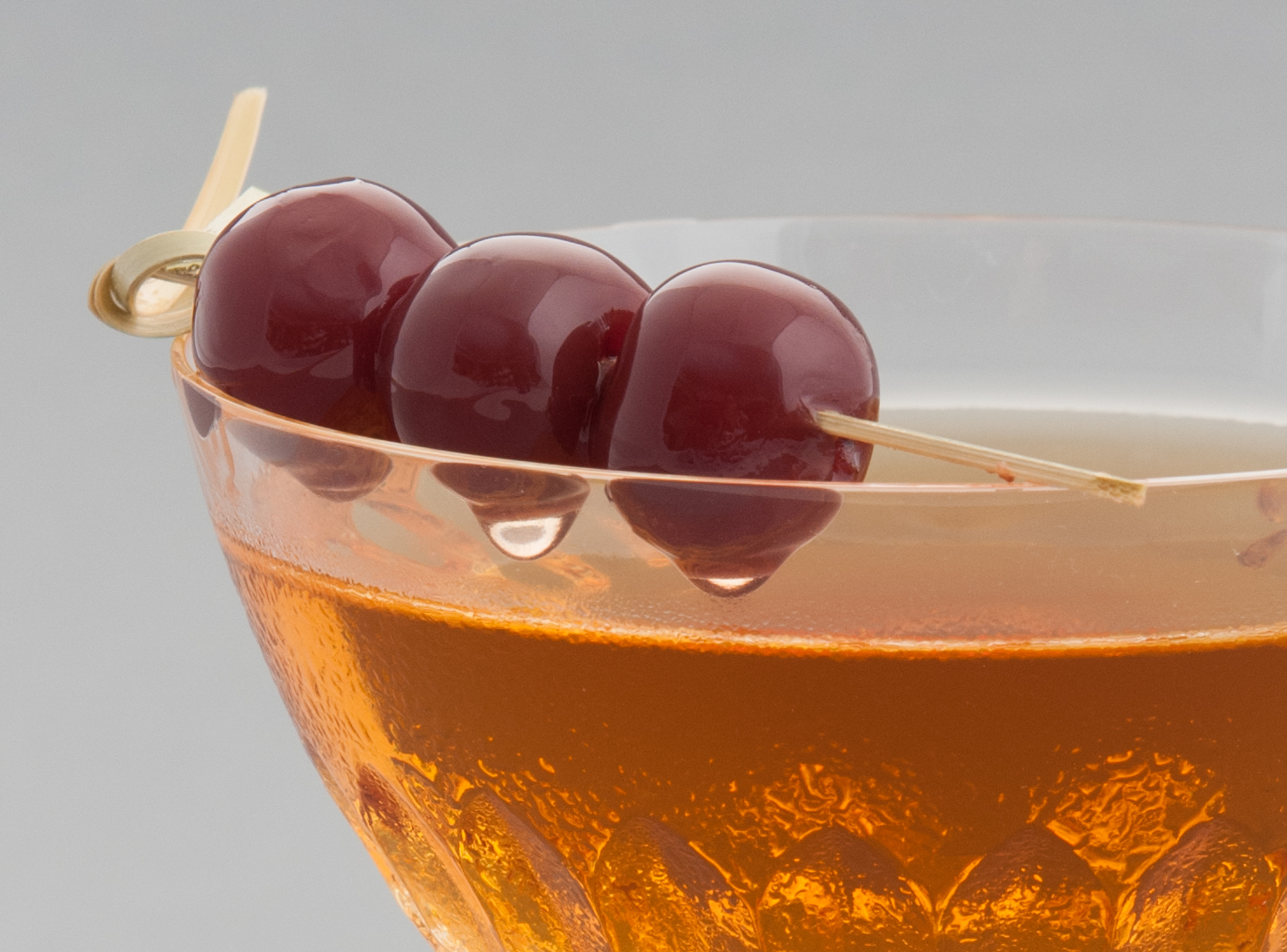 Martinez